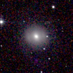 Galaxy NGC 4984